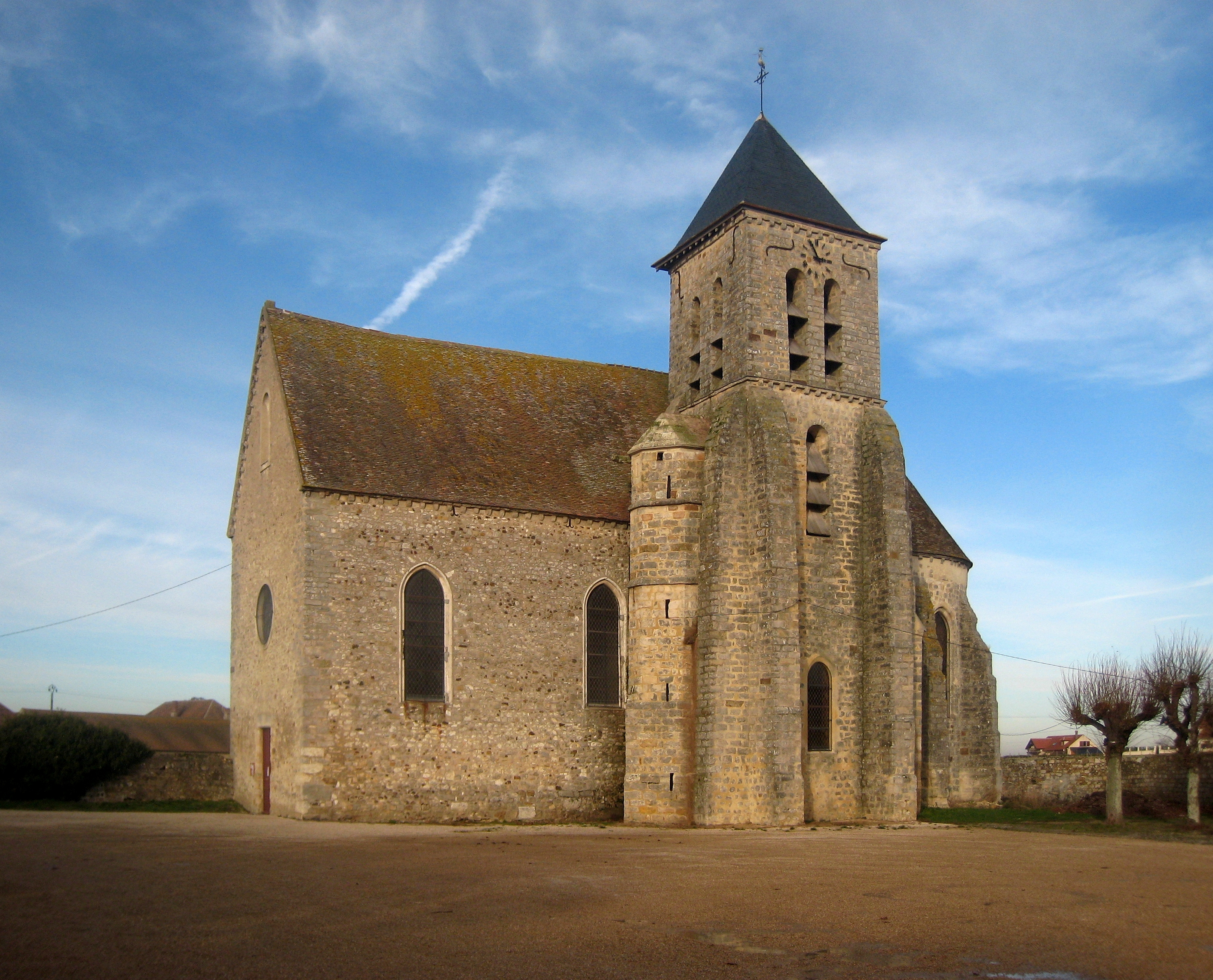 L'église d'Esmans (Seine et Marne)